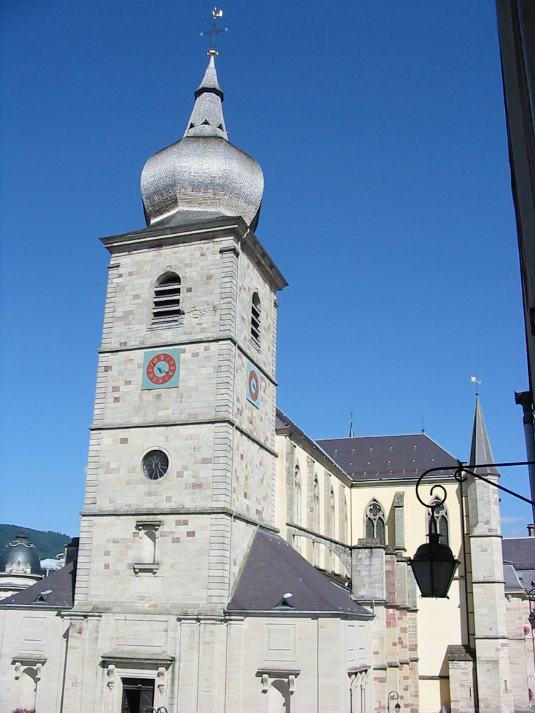 L'église Saint-Pierre de Remiremont (Vosges)